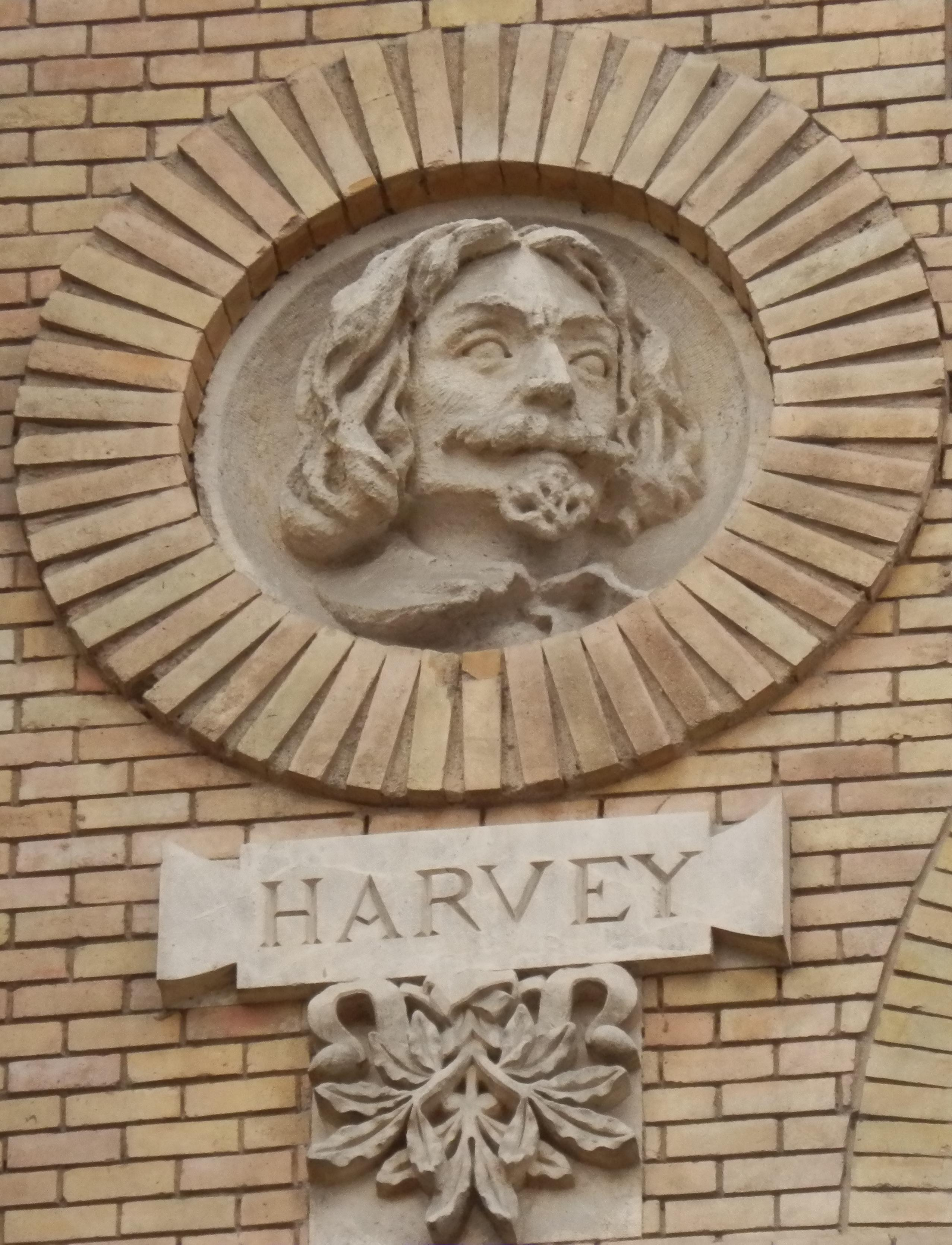 Estatua dedicada a Harvey en el Paraninfo de la Universidad de Zaragoza (Antigua Facultad de Medicina).